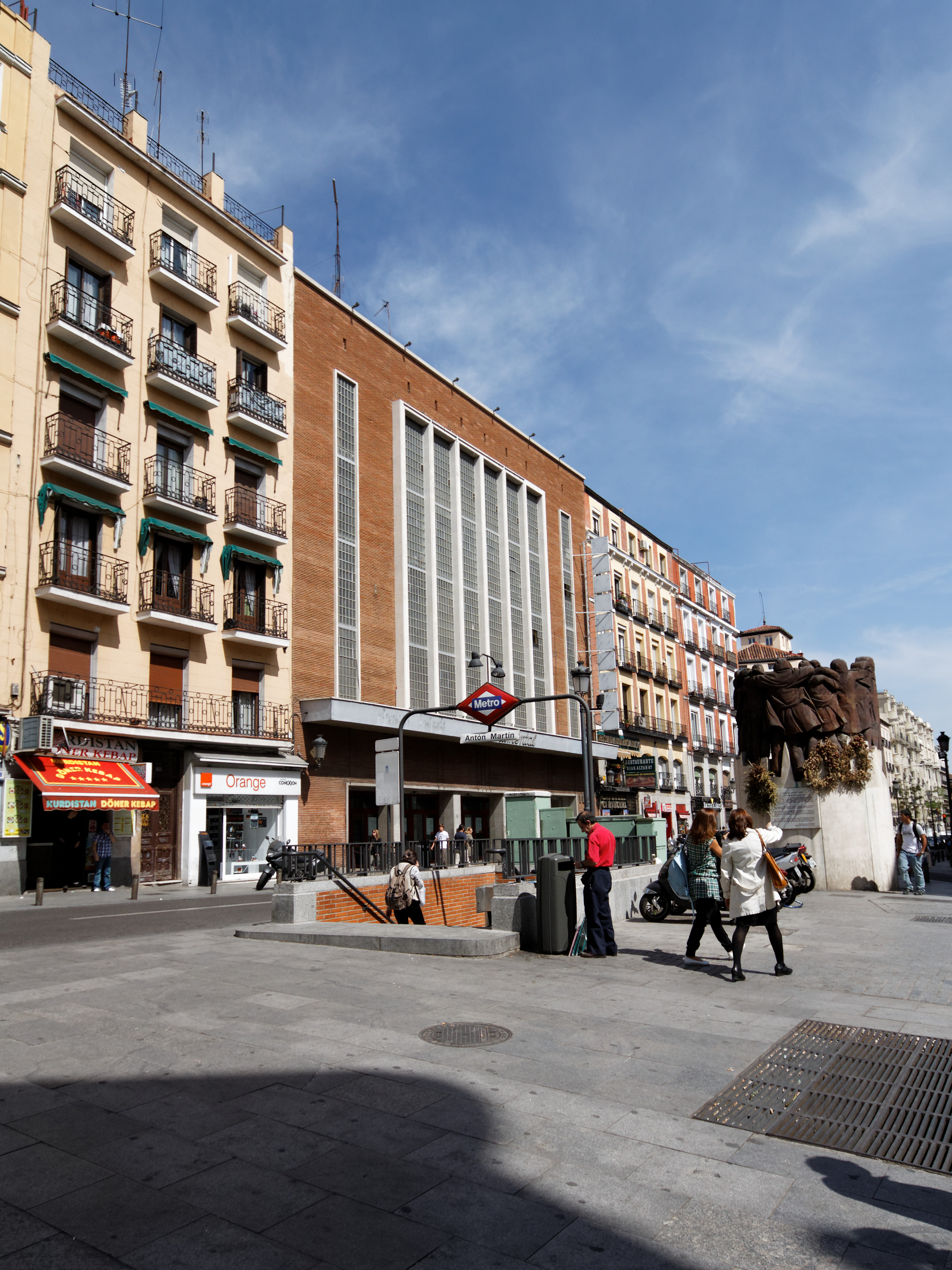 Plaza de Antón Martín, Madrid. Entrada a la estación de la línea 1 de Metro de Madrid. Teatro Monumental.